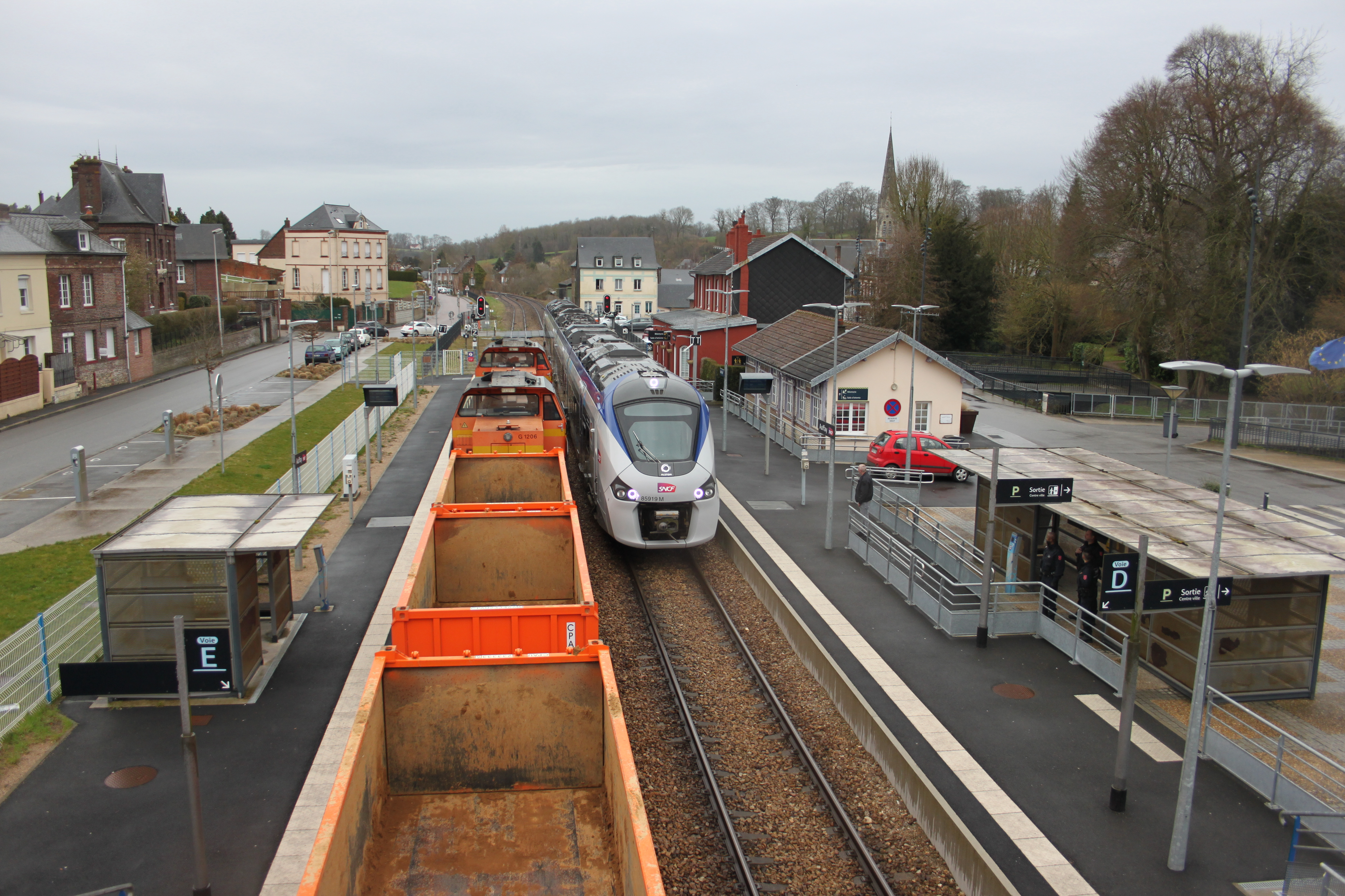 A Auffay, la gare, ligne de Malaunay à Dieppe, un train COLAS RAIL de wagons portes-bennes vides, attend le dégagement de la voie unique par un TER Dieppe - Rouen .